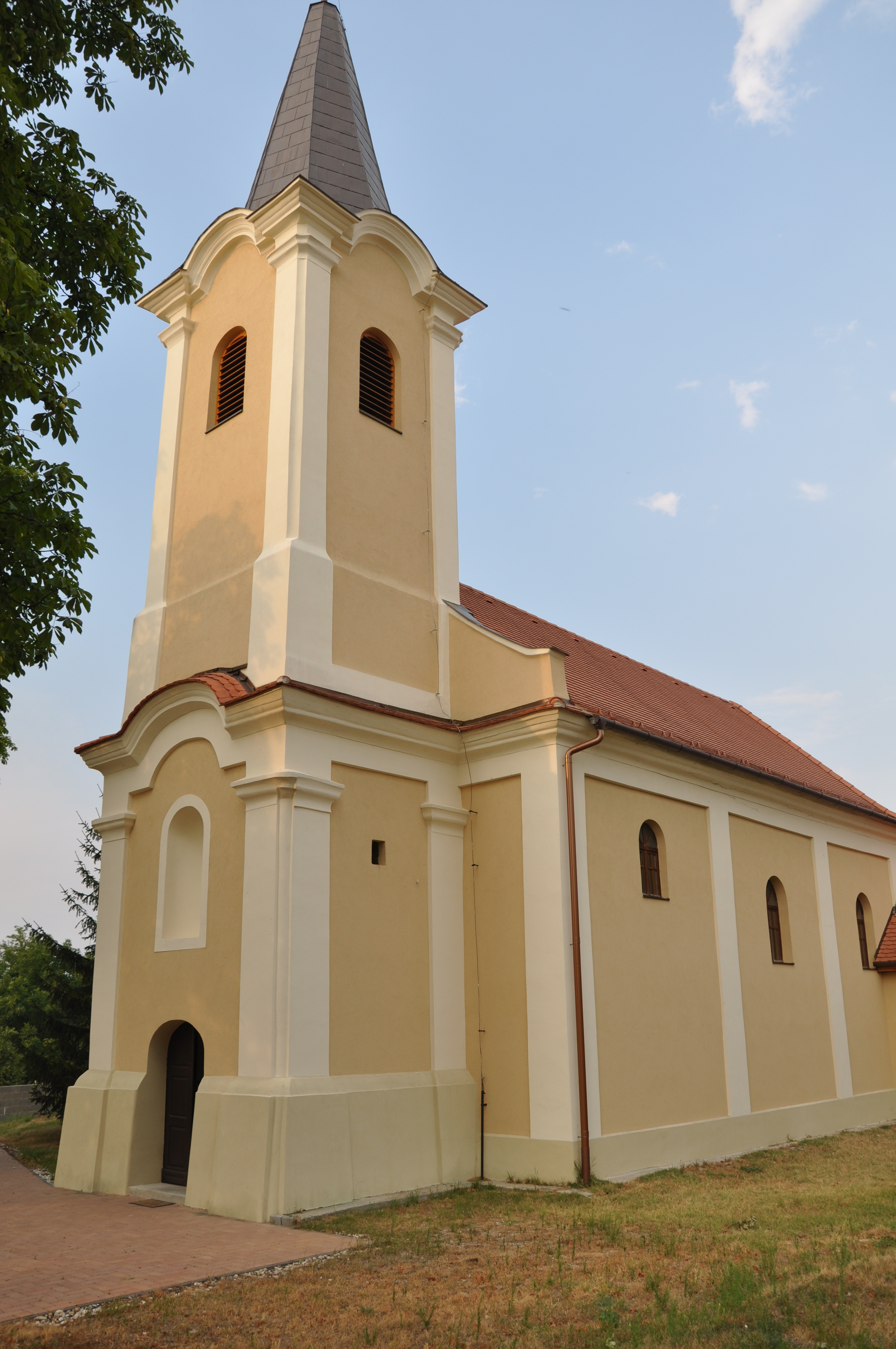 Aussenansicht der Kirche in Györsövényház